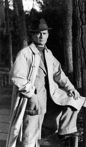 Fotografia di Mario dell'Arco